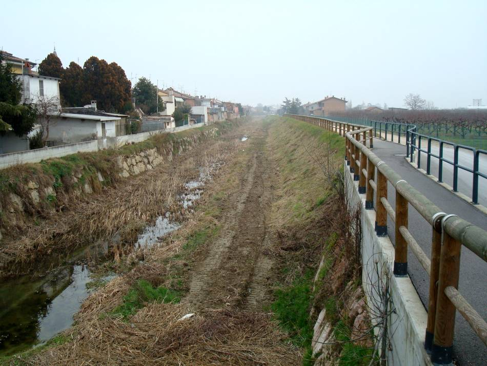 Rivière Piscatello à Macerone di Cesena (Italie)